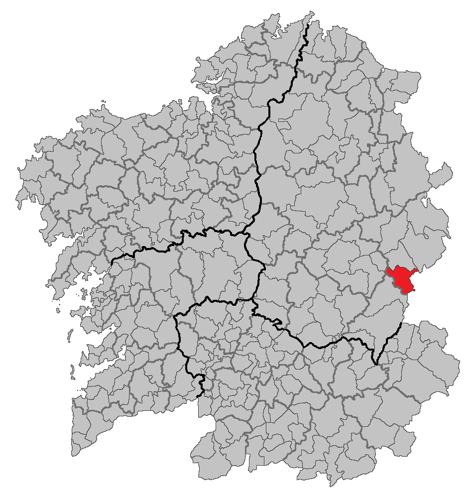 Mapa coa localización do concello de Pedrafita do Cebreiro.